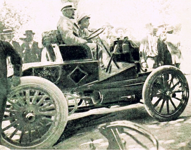 Camille Jenatzy, vainqueur du Critérium de Provence en 1900 sur Bolide 30 hp (La Vie au Grand Air, 22 juillet 1900, et Ruckert)